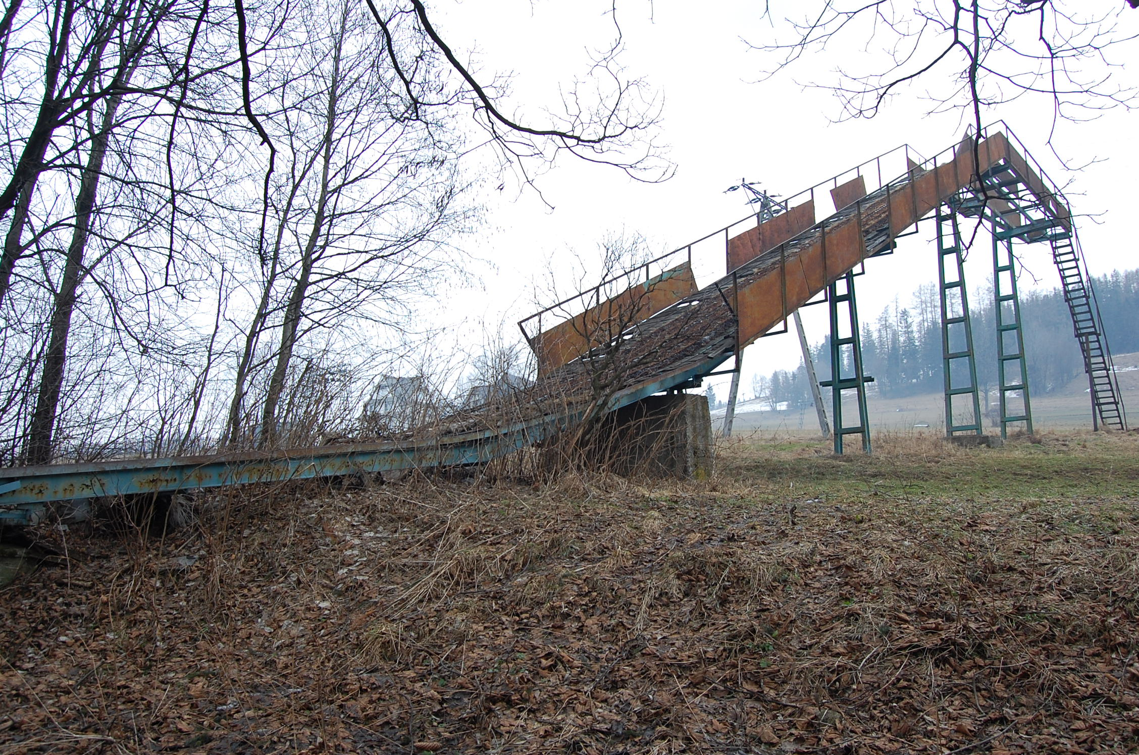 Rozbieg skoczni w Poroninie